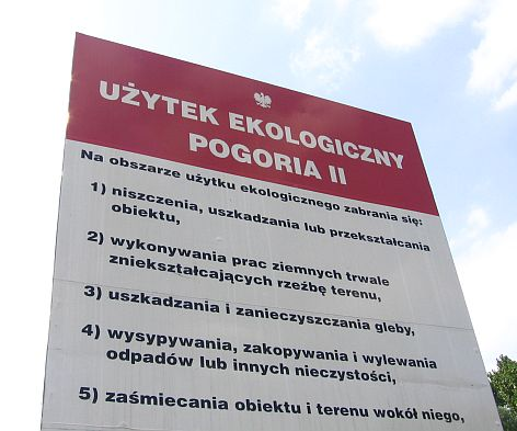 Pogoria II